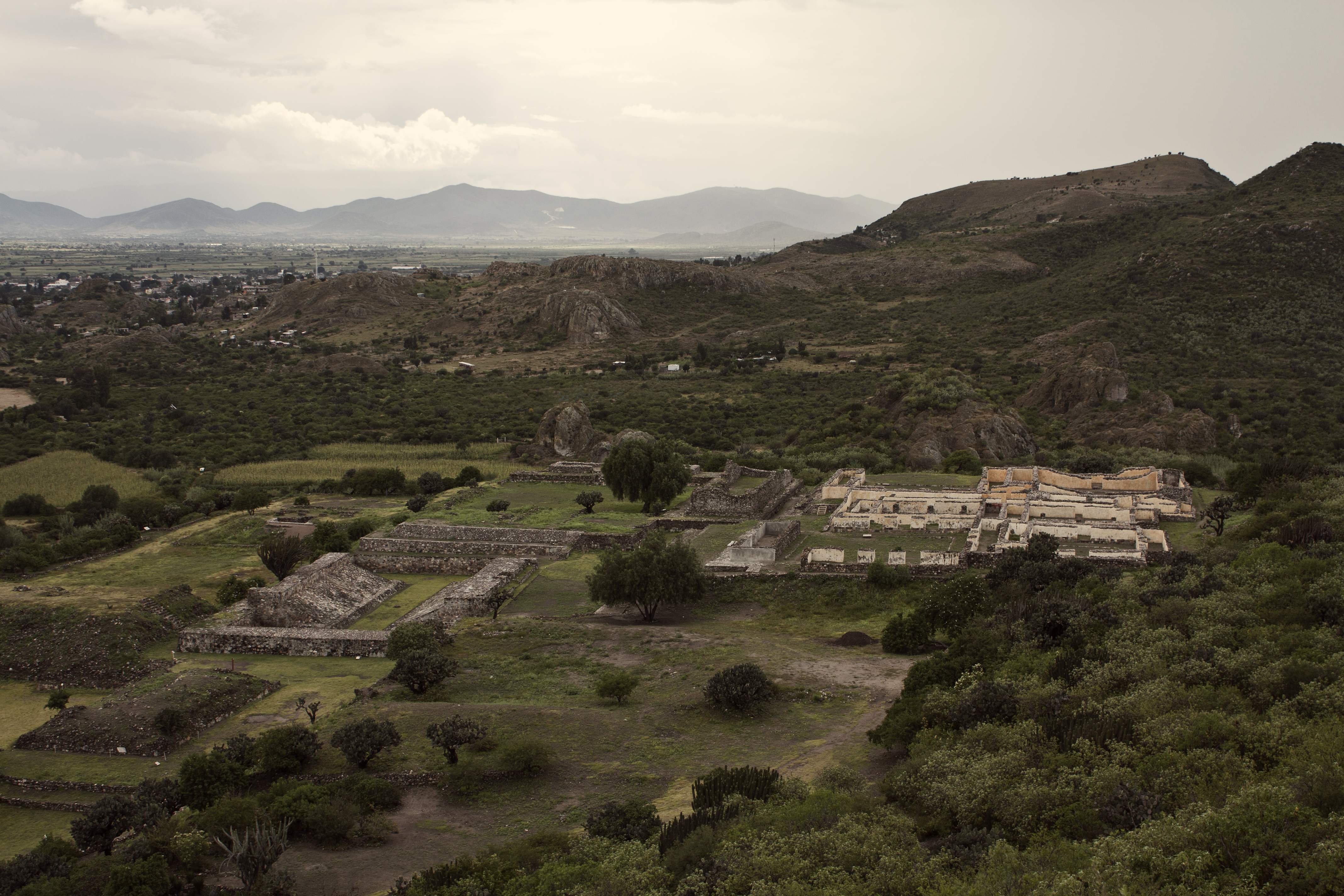 Vista de la zona arqueológica de Yagul Oaxaca